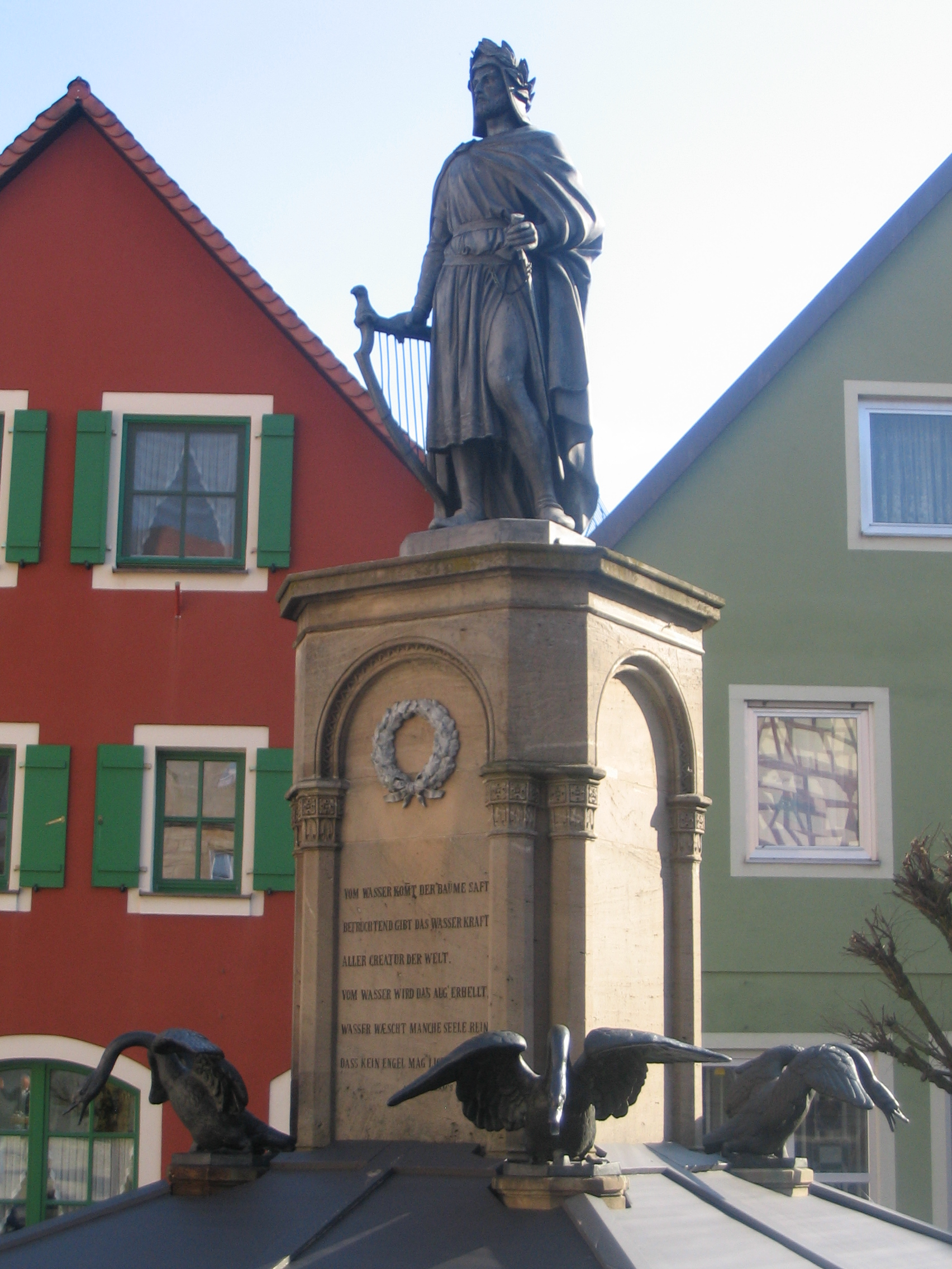 A monument of Wolfram von Eschenbach in Wolframs-Eschenbach. Built 1860/61